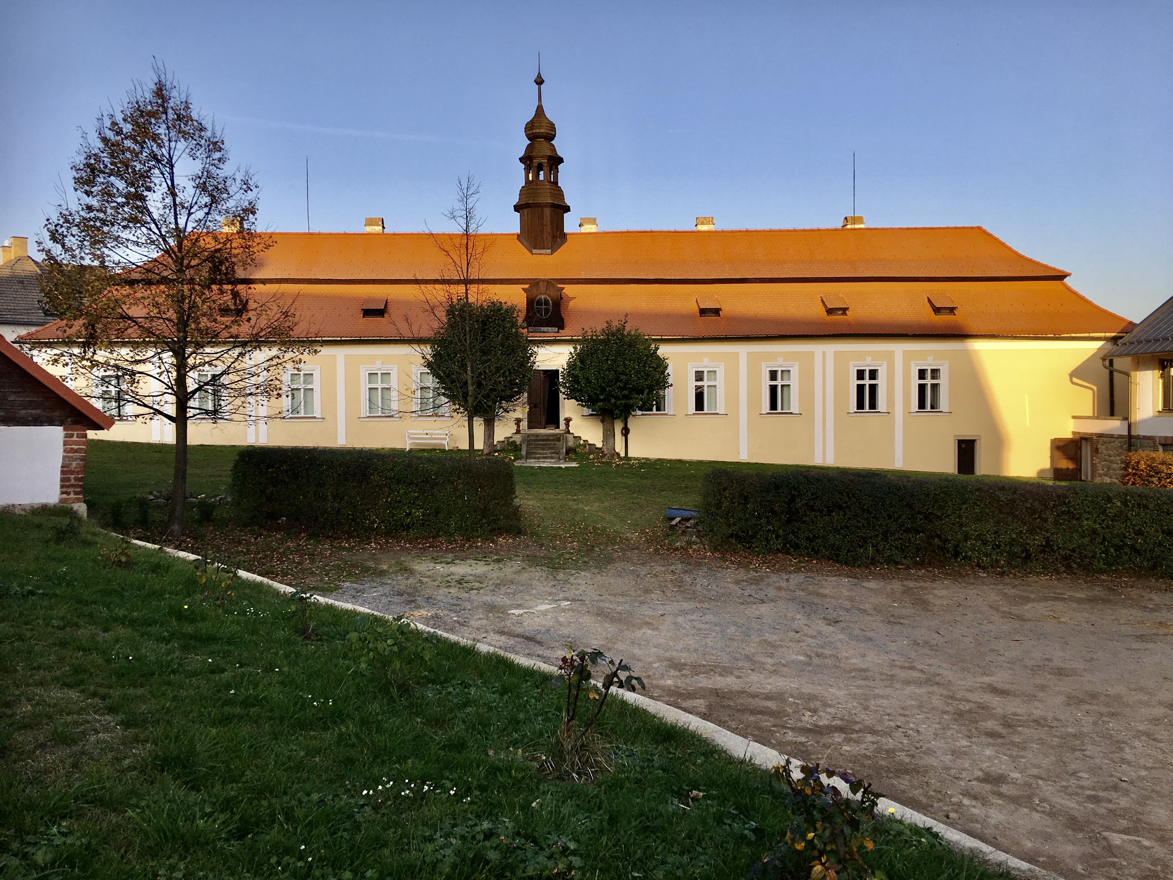 Zámek Palupín dnes